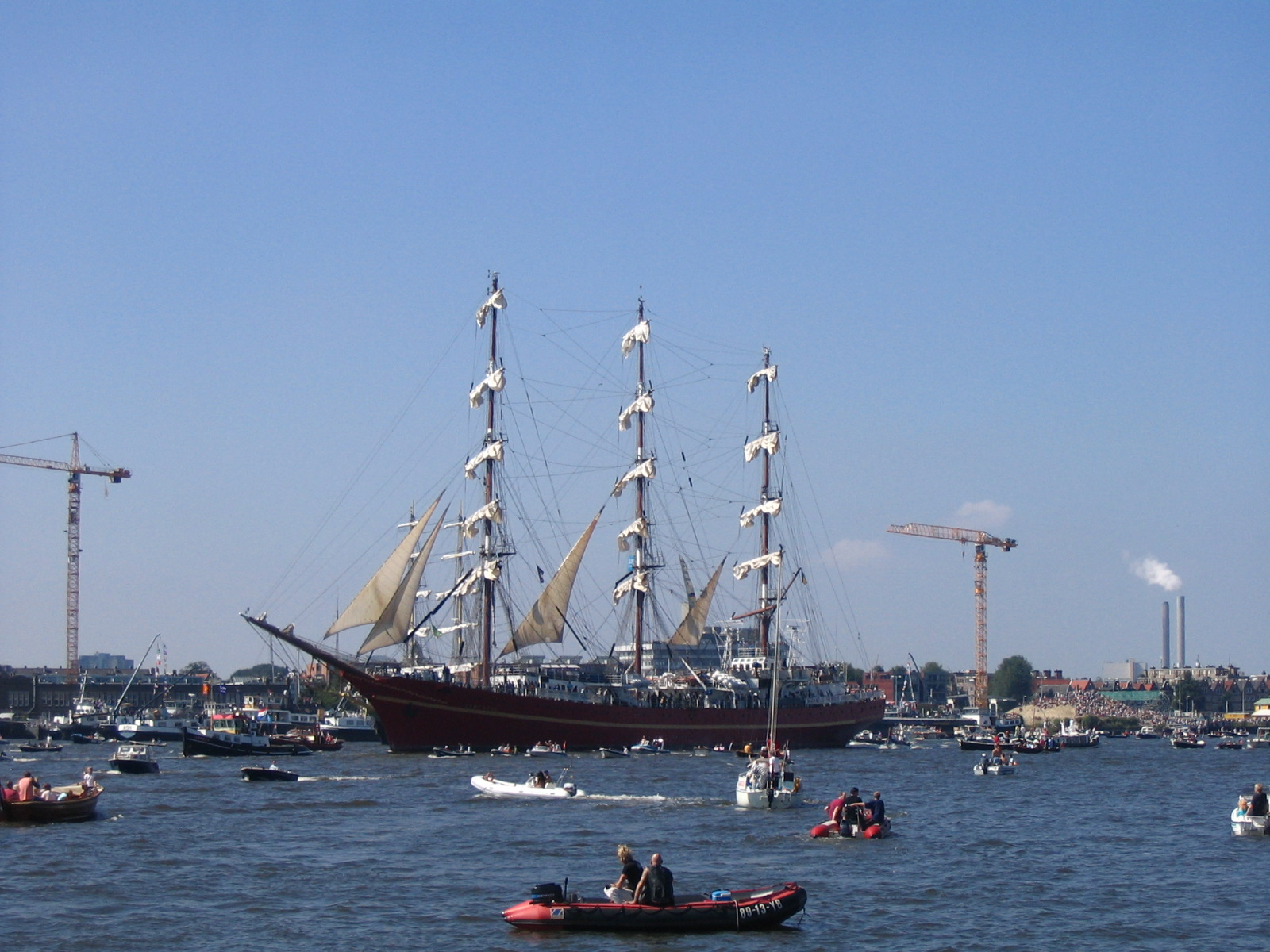 De chaos op het water tijdens de Sail-in 2005 Categorie:Afbeelding Sail Amsterdam